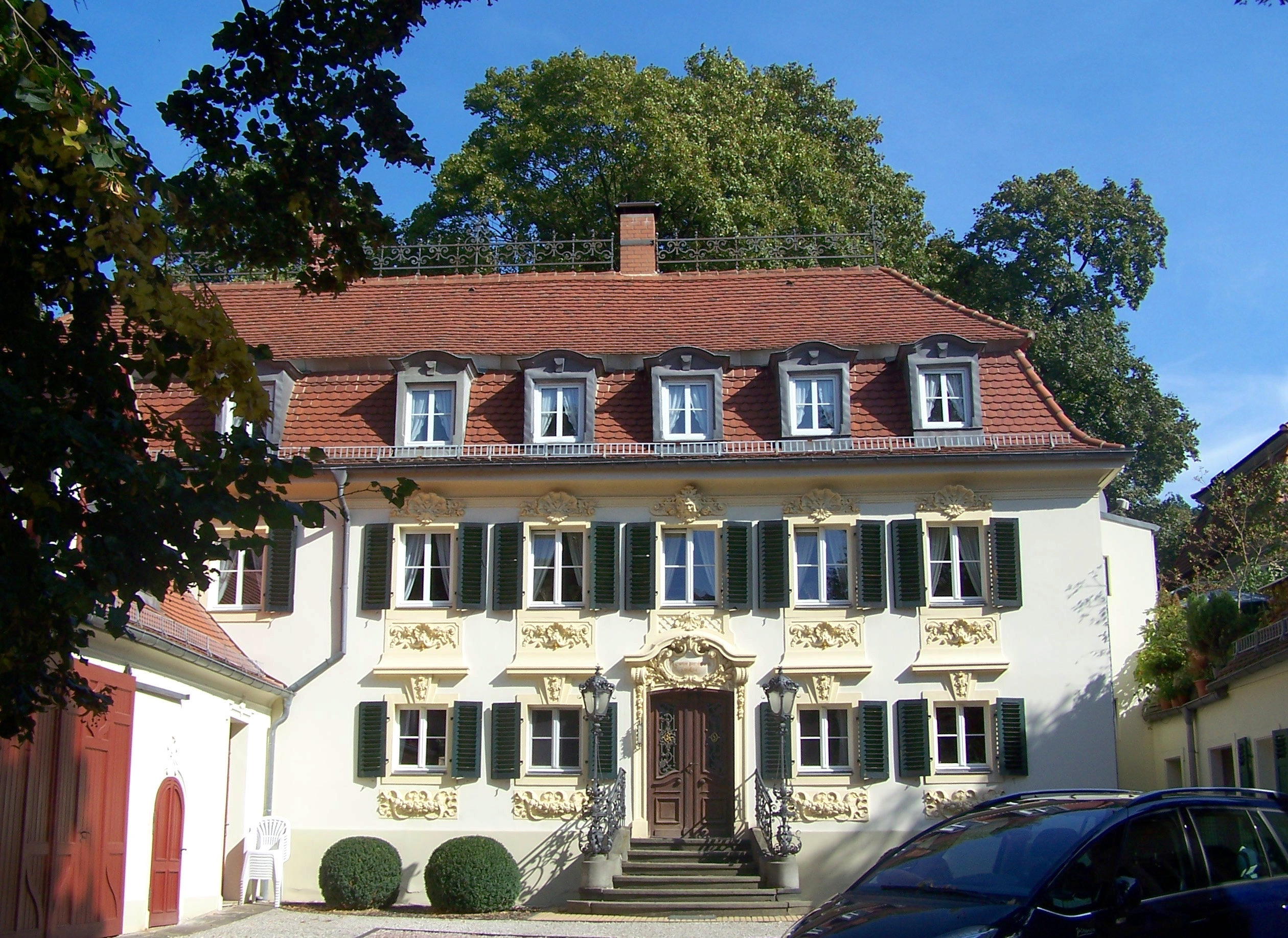 Villa Döbelner Straße 24 ("Spieglersches Haus") in Dresden-Trachenberge